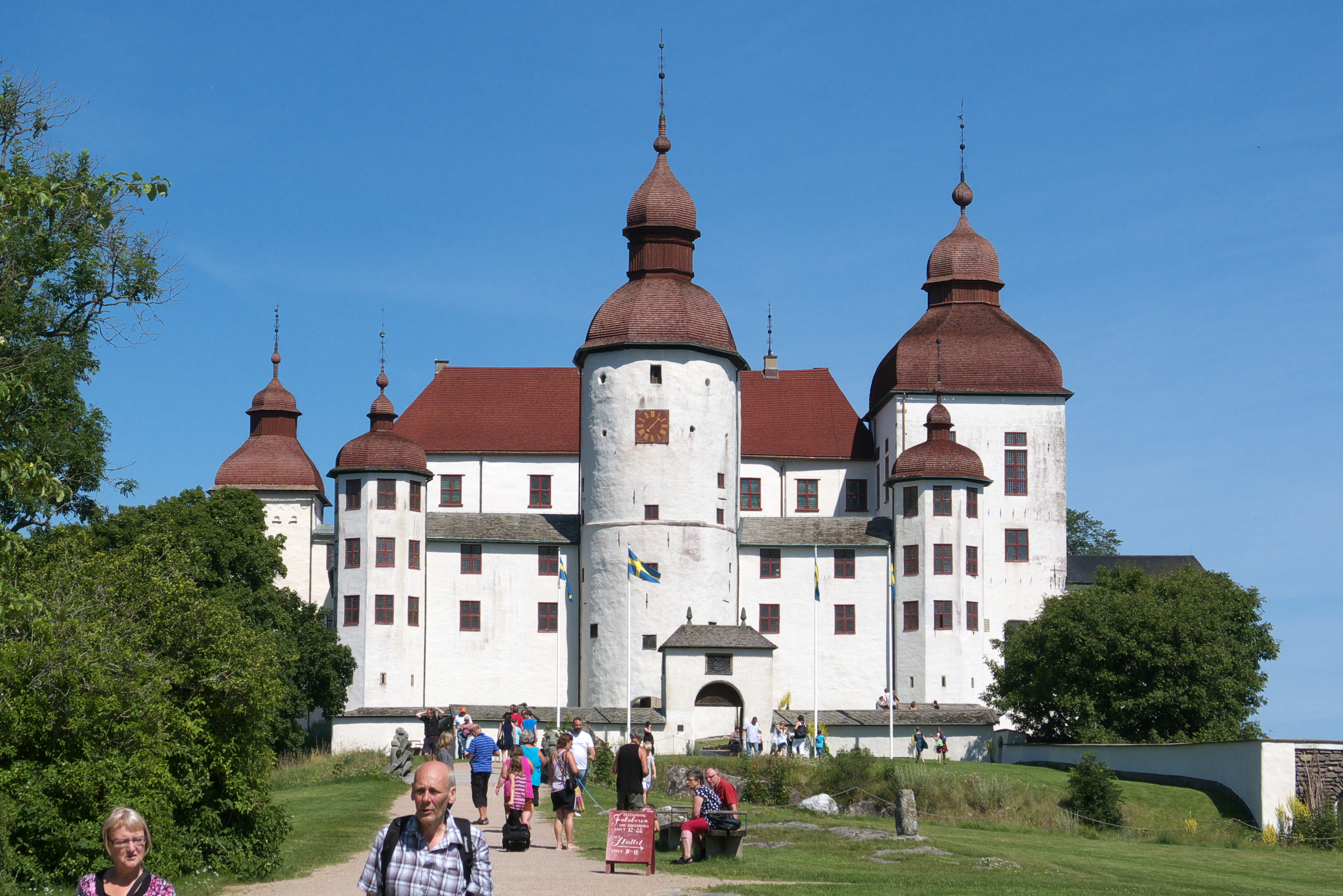 Läckö Slott